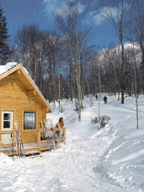 Ski de fond et chalet Parc national du Mont Tremblant, Laurentides / Cross-country skiing and cottage in Parc National du Mont Tremblant, Laurentians (Québec, Canada)